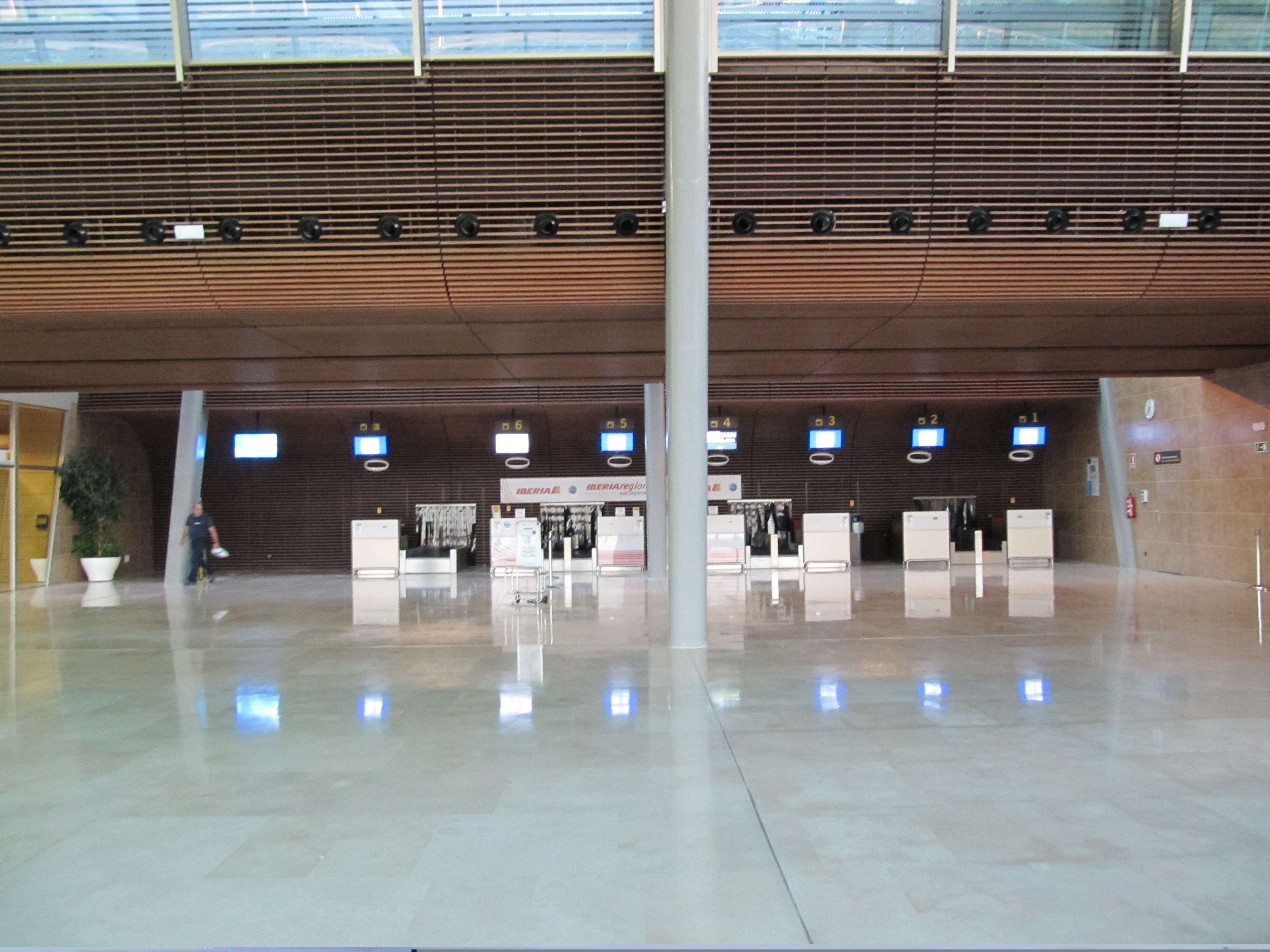 Mostradores de facturación de la nueva terminal del aeropuerto de León.